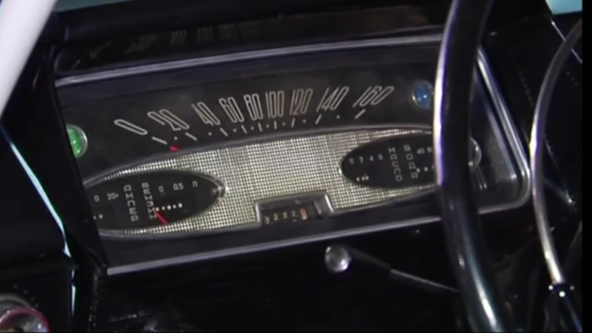 Tacho des Moskwitsch 412 von 1967 bis 1974. Im Gegensatz zum Tacho des Typ 408 endet die Höchstgeschwindigkeit nicht bei 140 sondern bei 160 km/h. Keine anderen Unterschiede. Neuer Tacho mit Rundinstrumenten ab 1975.